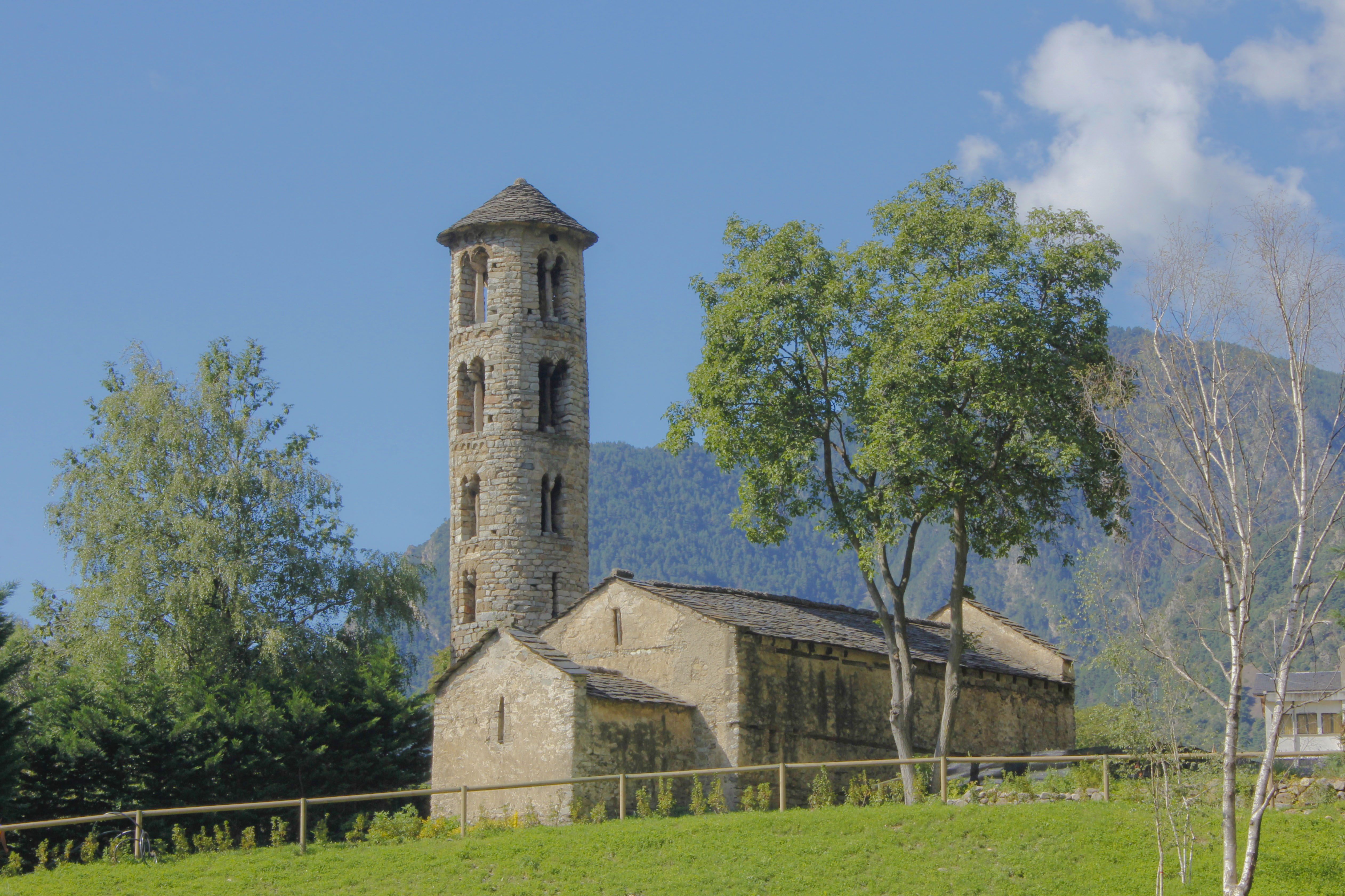 Església de Santa Coloma